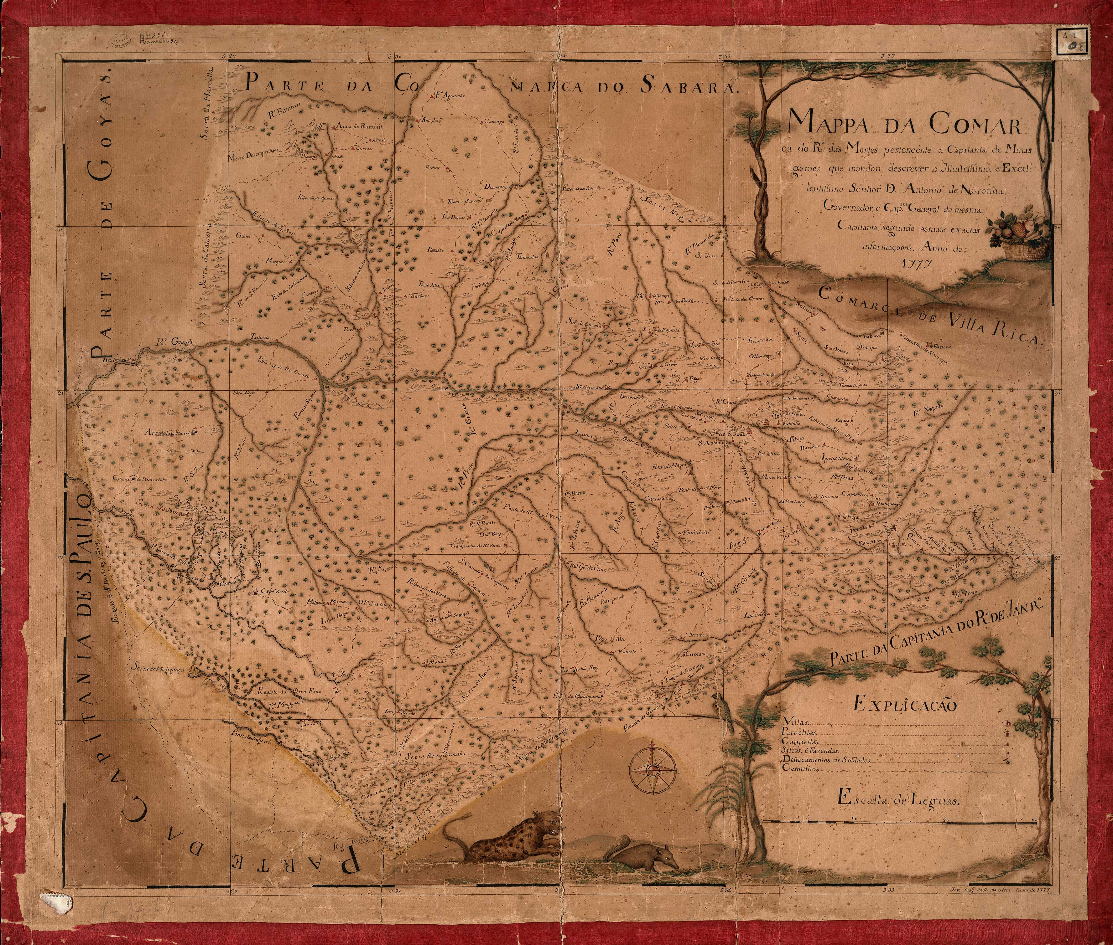 Mappa da Comarca do Rio das Mortes, pertencente a Capitania das Minas Gerais [Cartográfico] : que mandou descrever o Ilustrissimo e Excelentissimo Senhor D. Antonio de Noronha Governador e Cap. am General da mesma Capitania segundo as mais exactas informaçõens / Jozé Joam. da Rocha o fes.